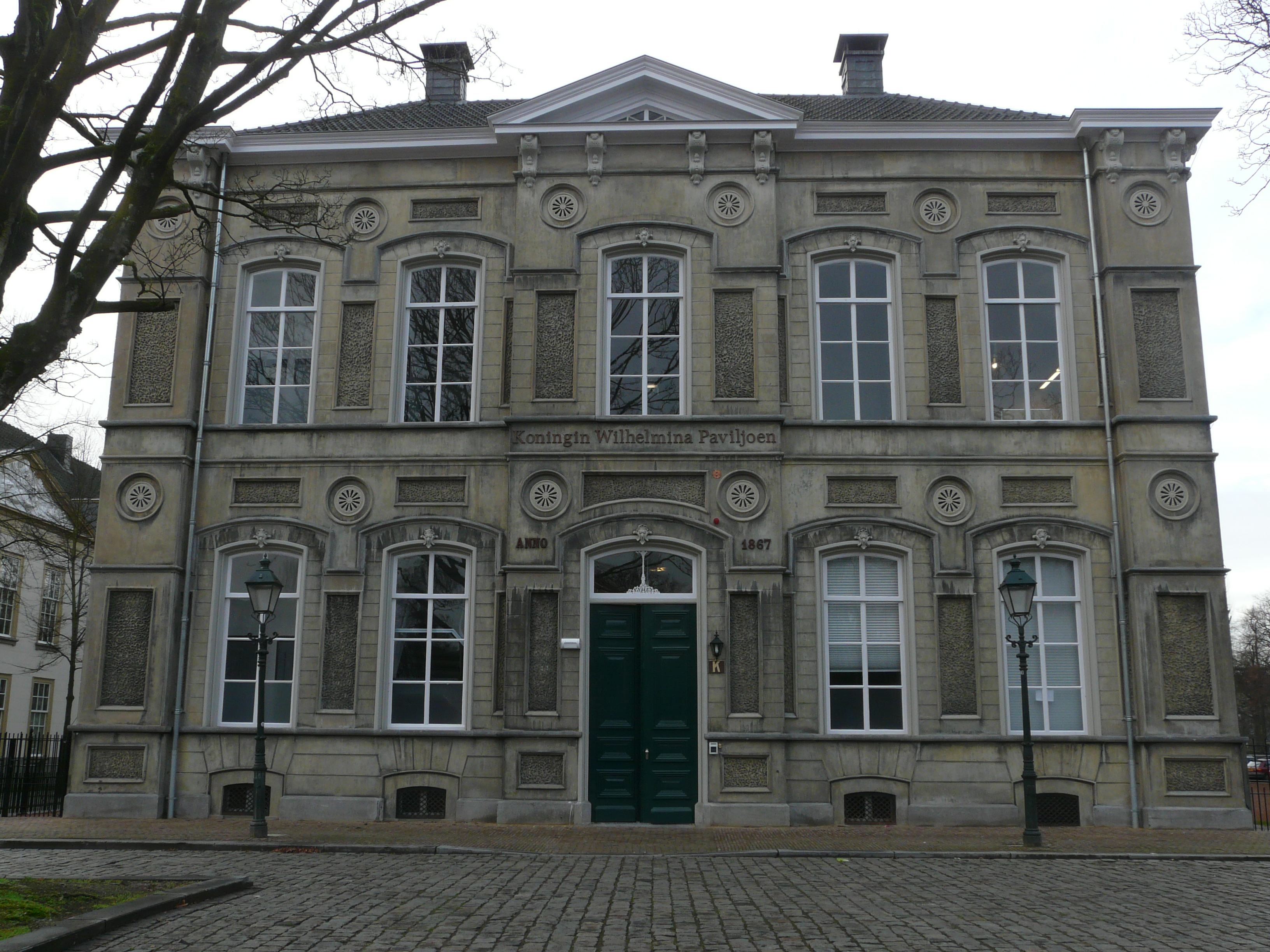 Zicht op een deel van het Koningin Wilhelmina Paviljoen nabij het Kasteelplein in het centrum van Breda